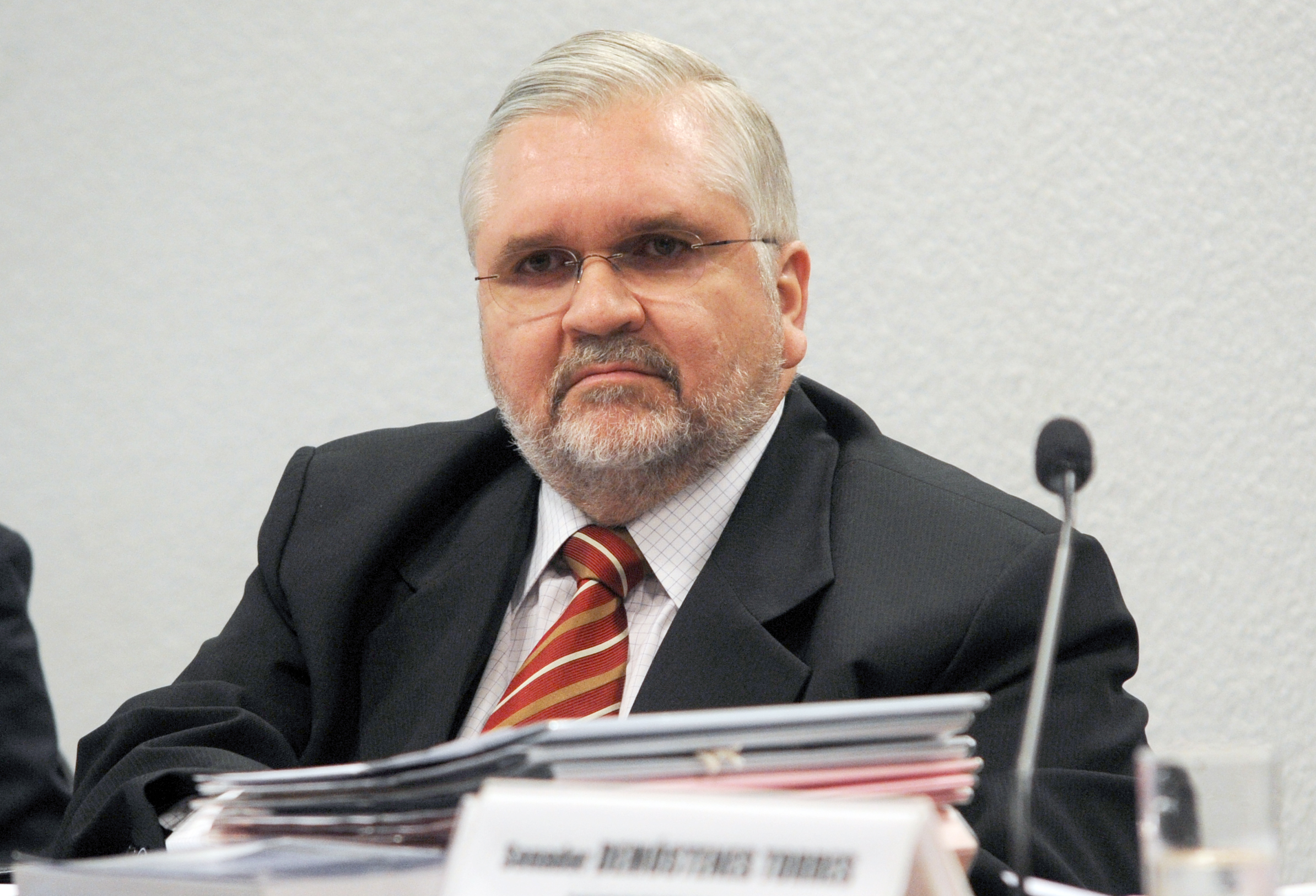 Roberto Monteiro Gurgel Santos, indicado para o cargo de procurador-geral da República, é sabatinado no Senado.